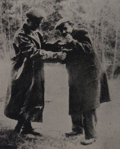 OP-11 R. Myśliwiec i W. Pikul, lata 1943 - 1944 lata 1943-1944, autor nieznany, opublikowane na terenie Polski przed 1994 rokiem ("Z walk na Podkarpaciu" PAX 1971).